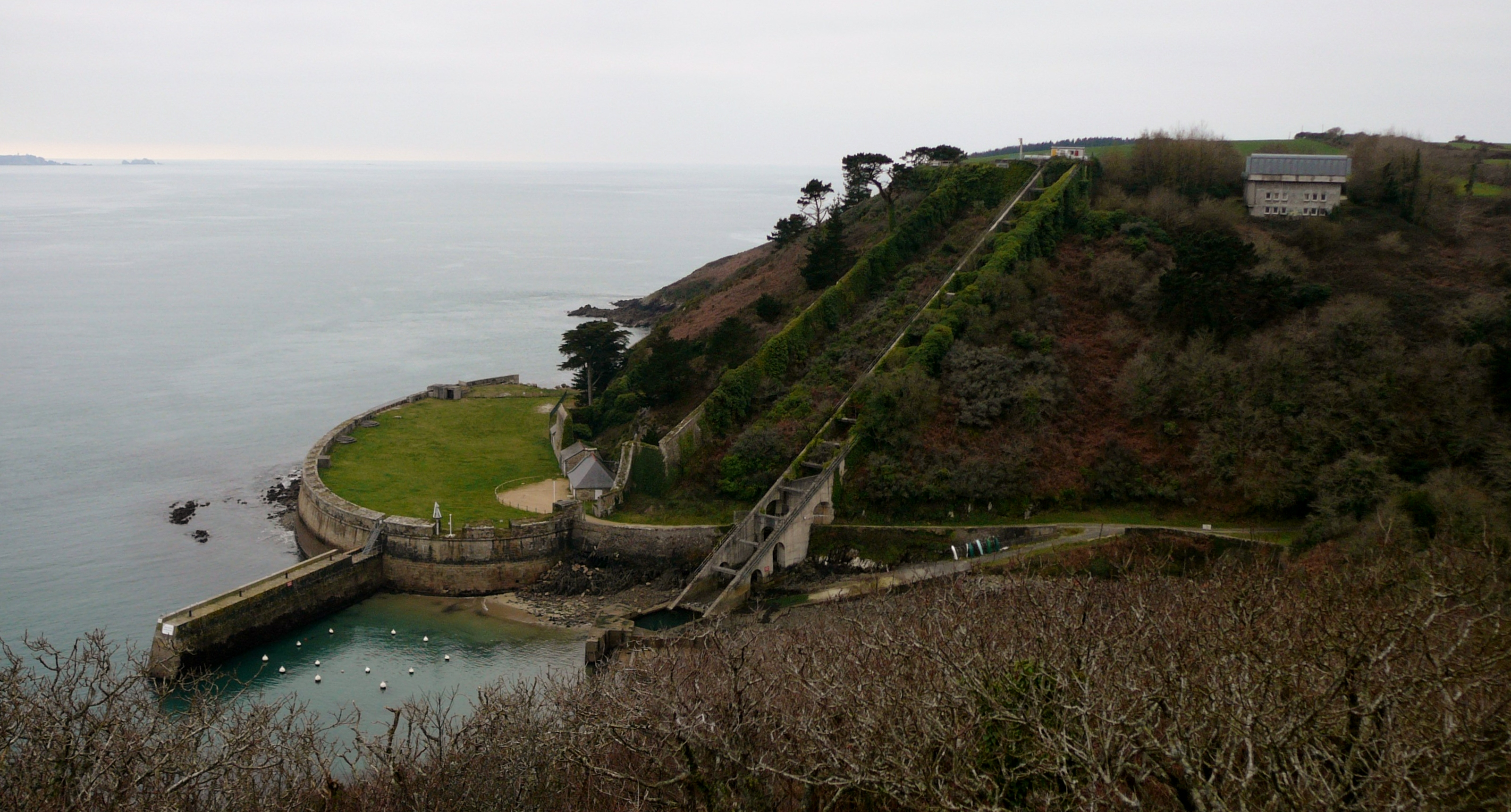 Fort du Mengant